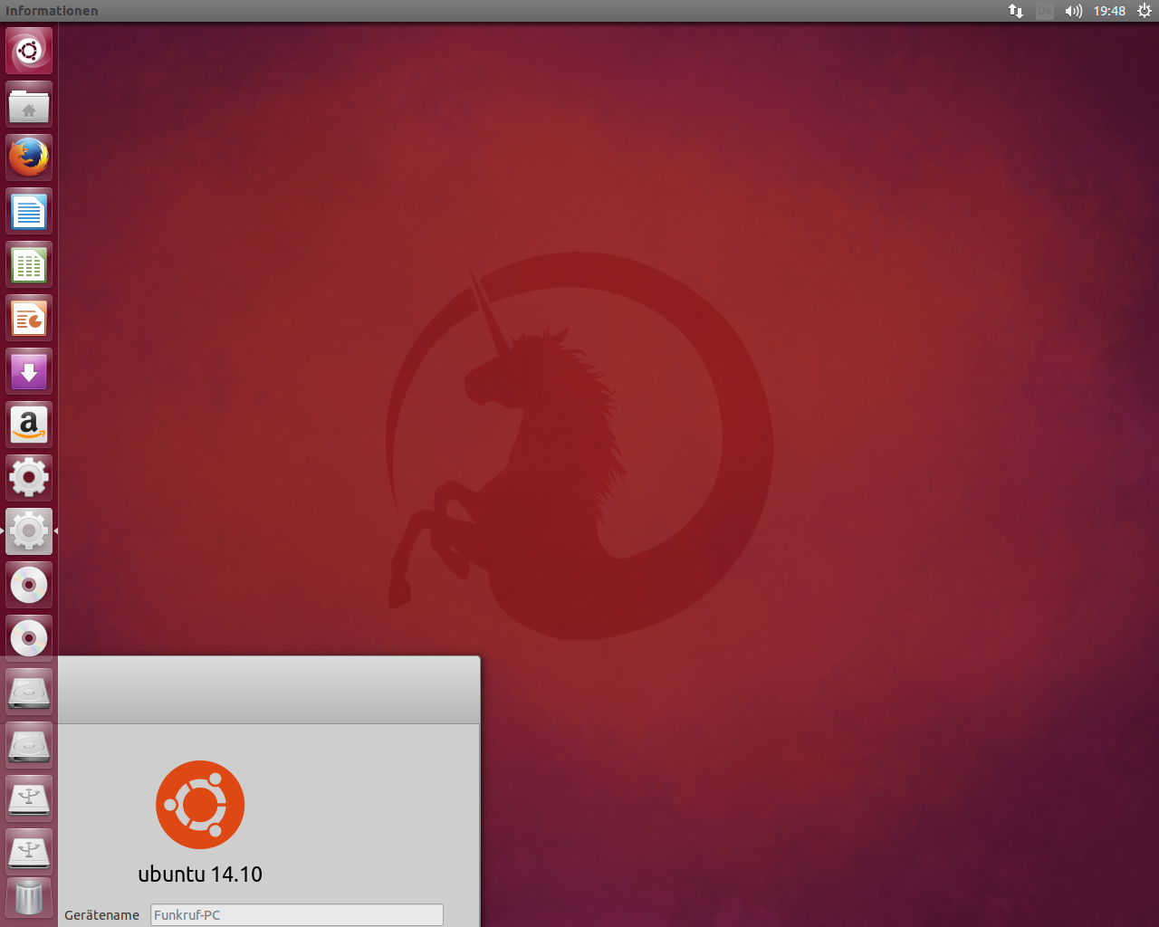 Desktop von Ubuntu 14.10